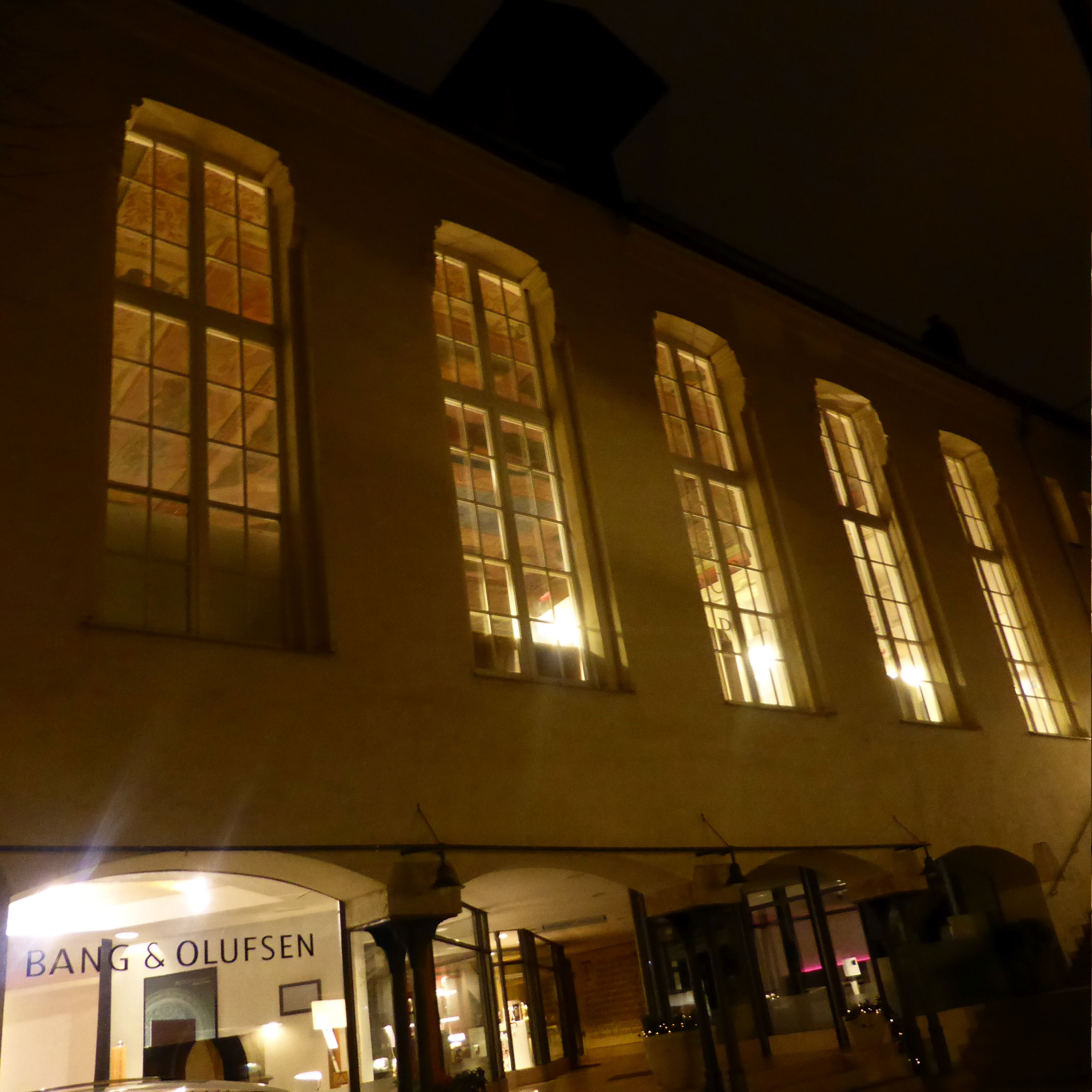 Goldenes Kreuz (Kreuzsaal vom Innenhof aus)